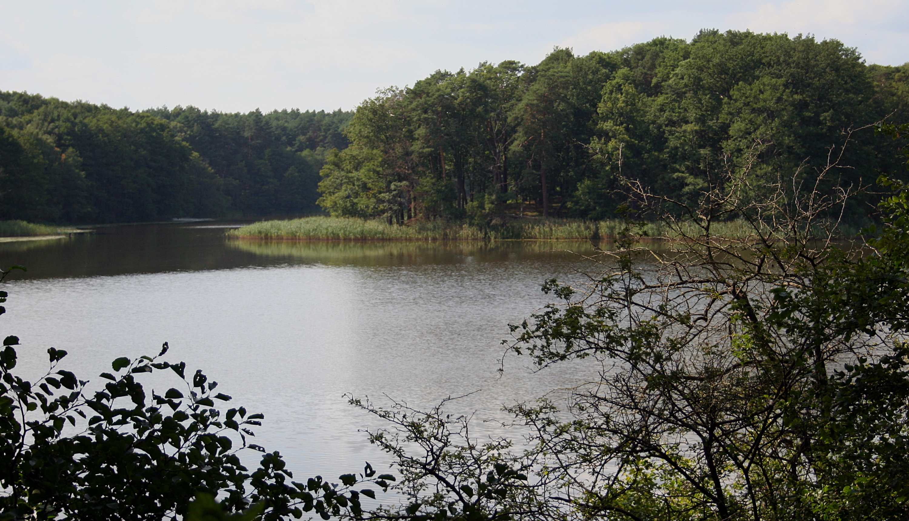 Jezioro Kłosowskie z widocznym w tle rezerwatem Czaple Wyspy